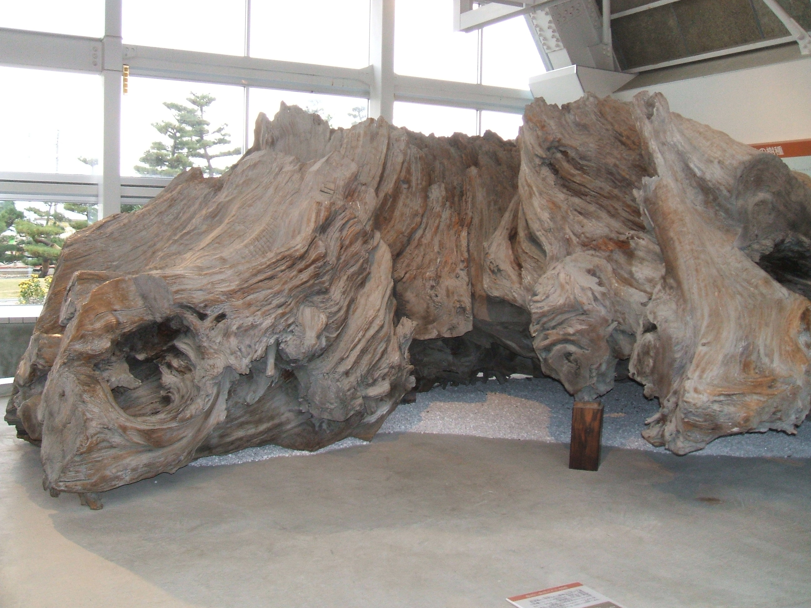 富山県魚津市にある魚津埋没林博物館の展示埋没林